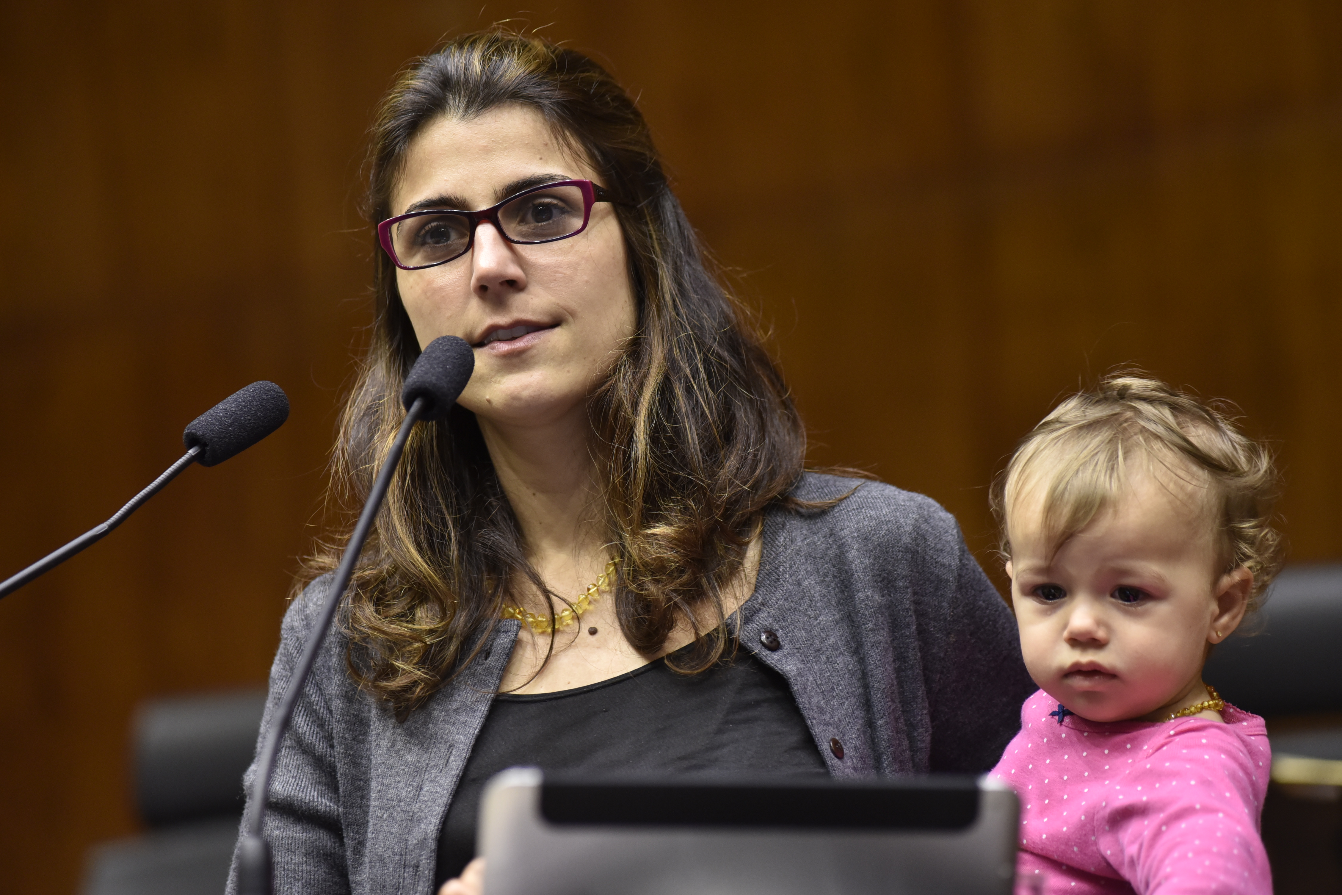 Manuela d'Ávila segurando a filha Lara enquanto discursa na Assembleia Legislativa do Rio Grande do Sul.